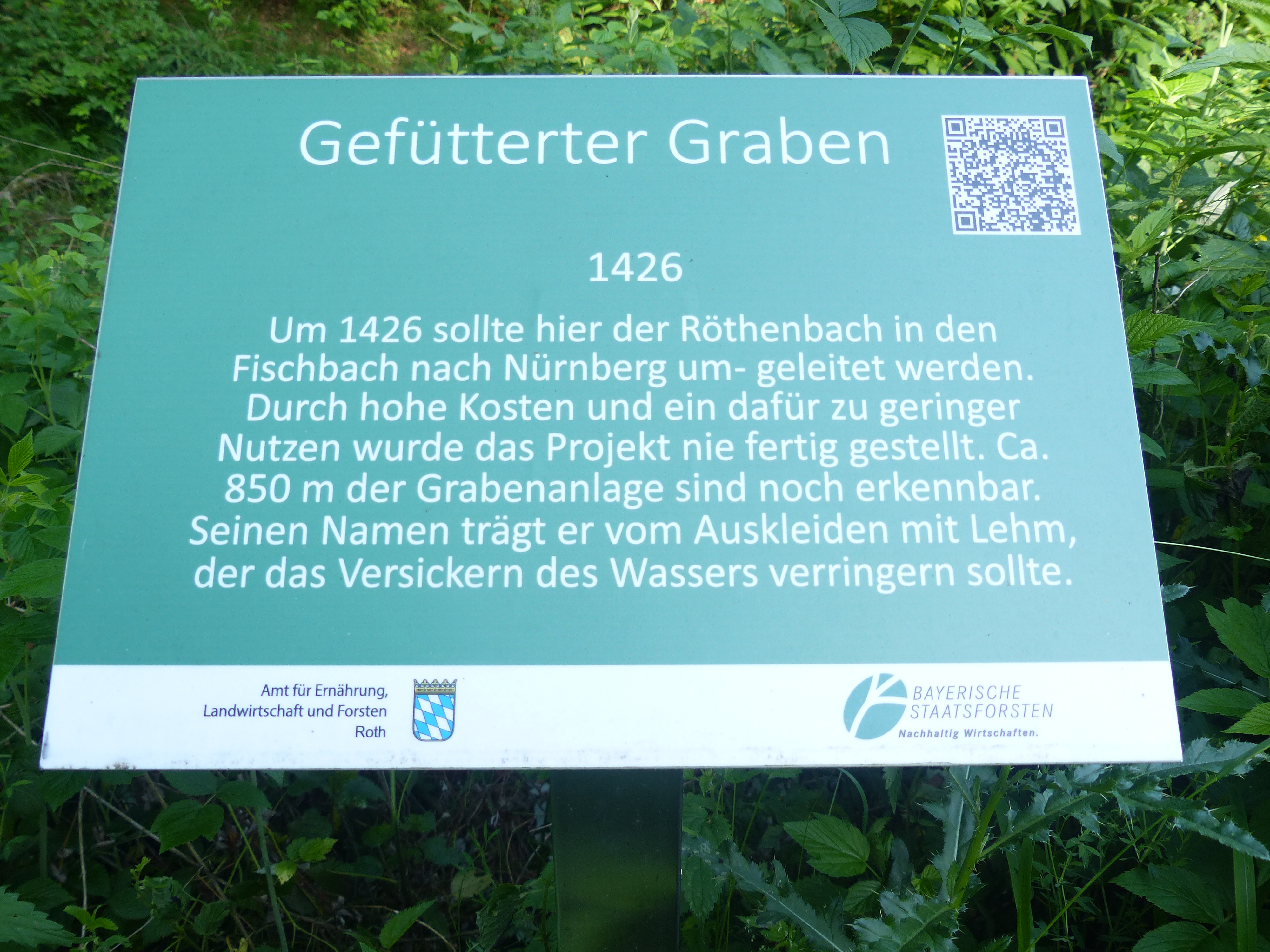 Informationstafel am Gefütterter Graben bei Ungelstetten